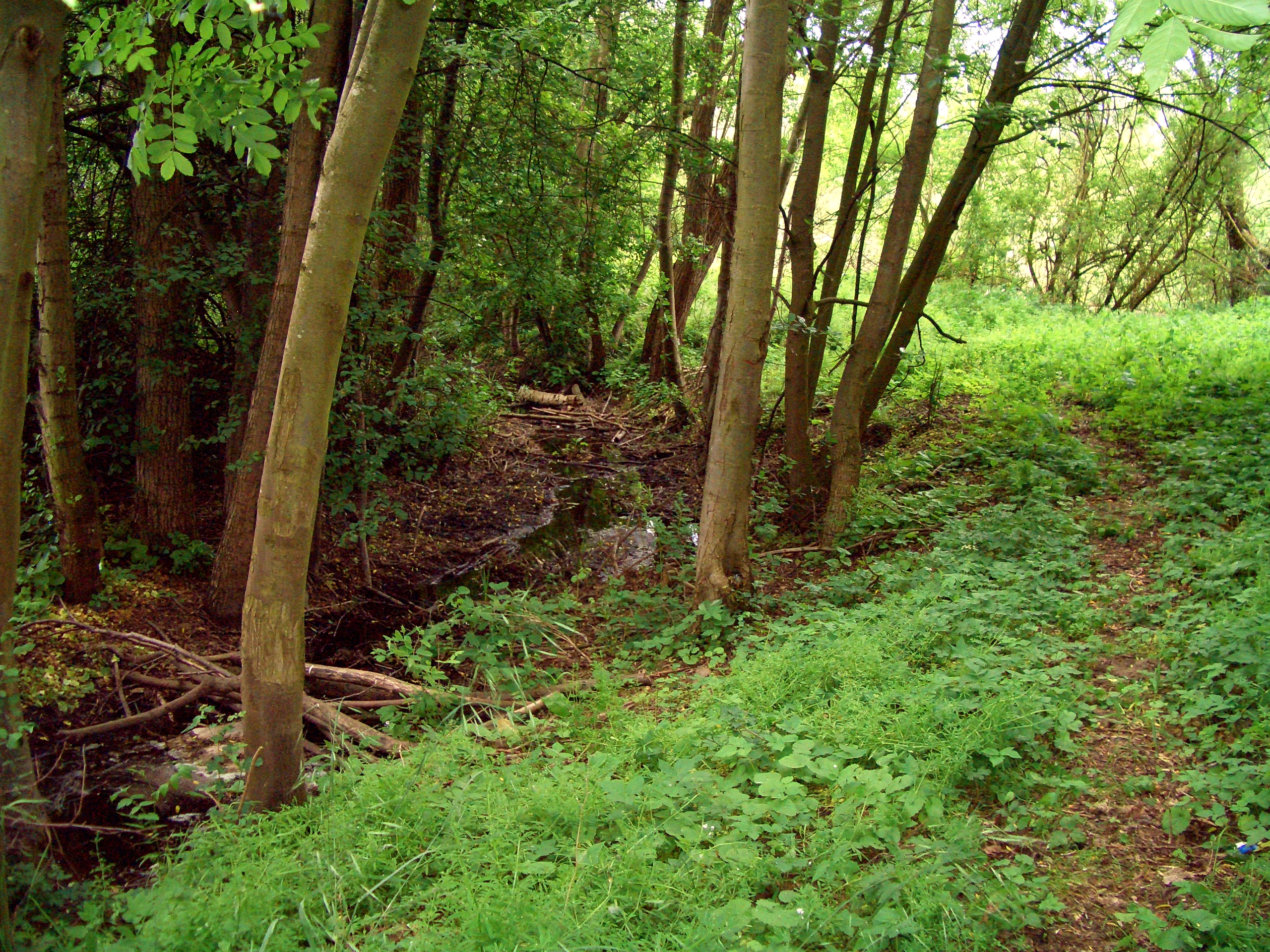 Vollbütteler Riede bzw. ein Zufluss nördlich von Rethen, Blick nach Westen, im Hintergrund ein Teich